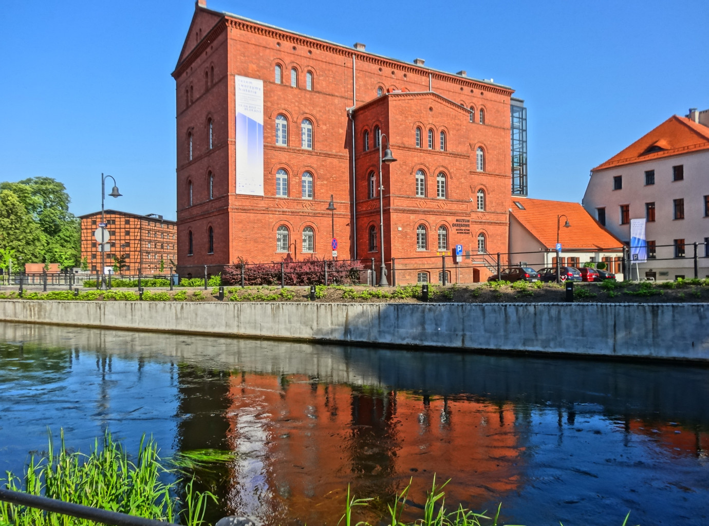 Czerwony Spichlerz na Wyspie Młyńskiej w Bydgoszczy; dawny młyn Camphausena z 1861 r., od 2009 r. mieści galerię sztuki nowoczesnej